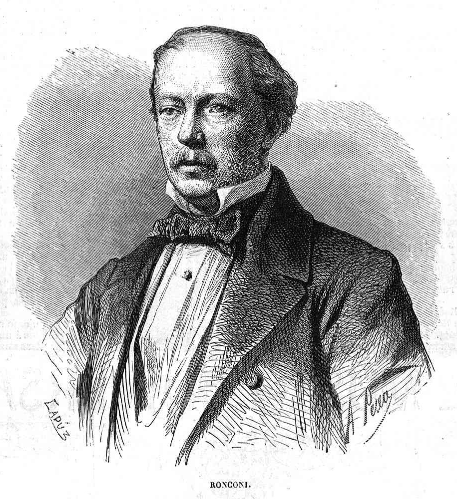 «Ronconi», en la revista española El Museo Universal.